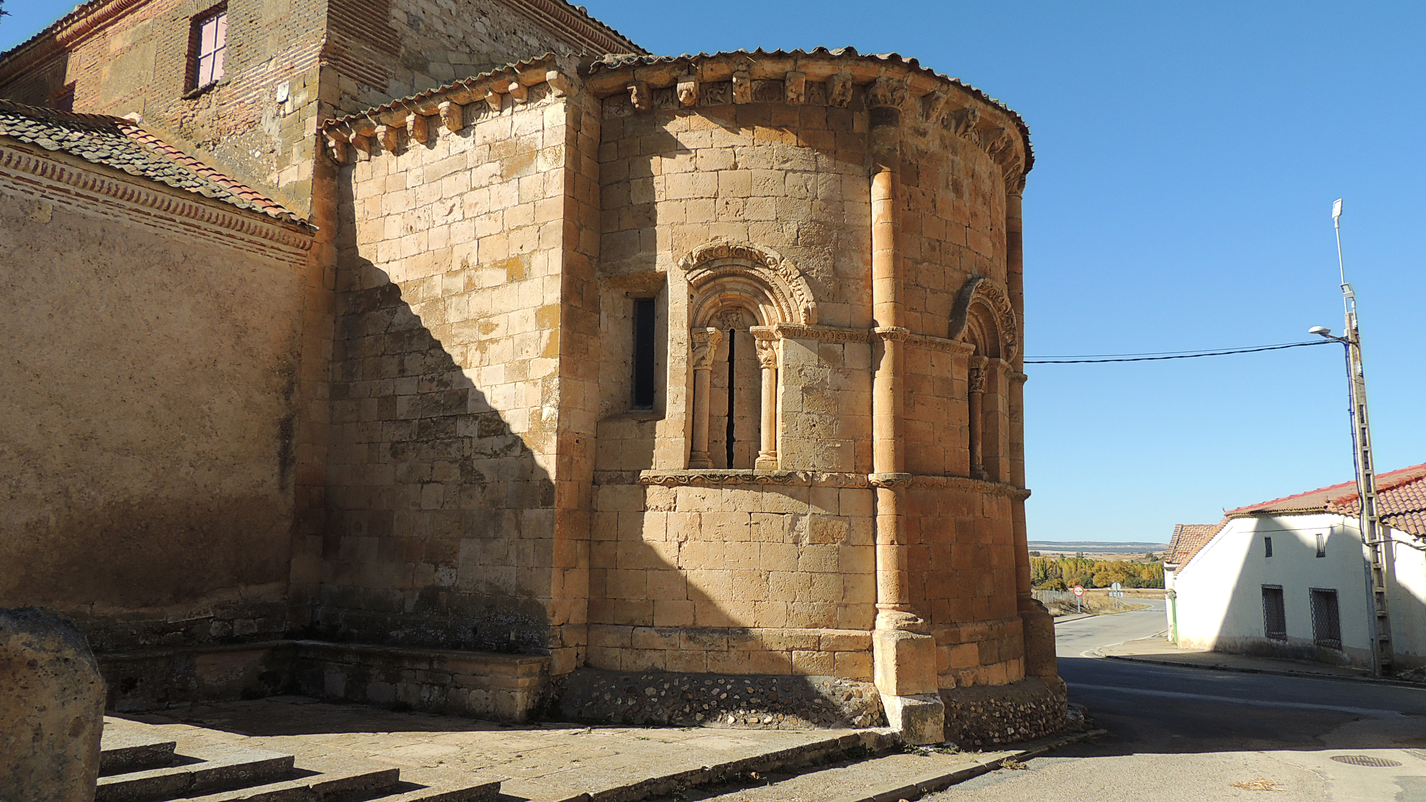 Sequera del Fresno - Iglesia de Ntra. Sra. de la Asuncion